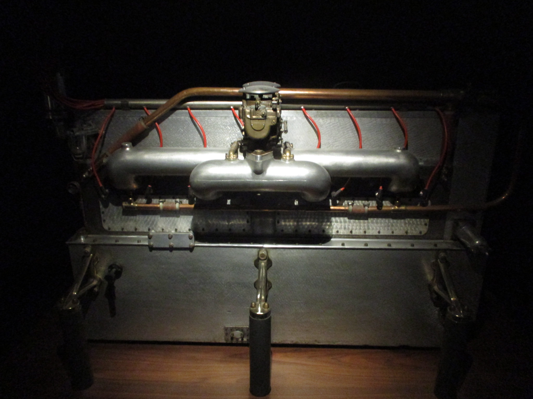 Moteur Bugatti Royale Type 41 ( 8 cylindre de 12,7 L ) Cité de l'automobile de Mulhouse Bugatti Type 41